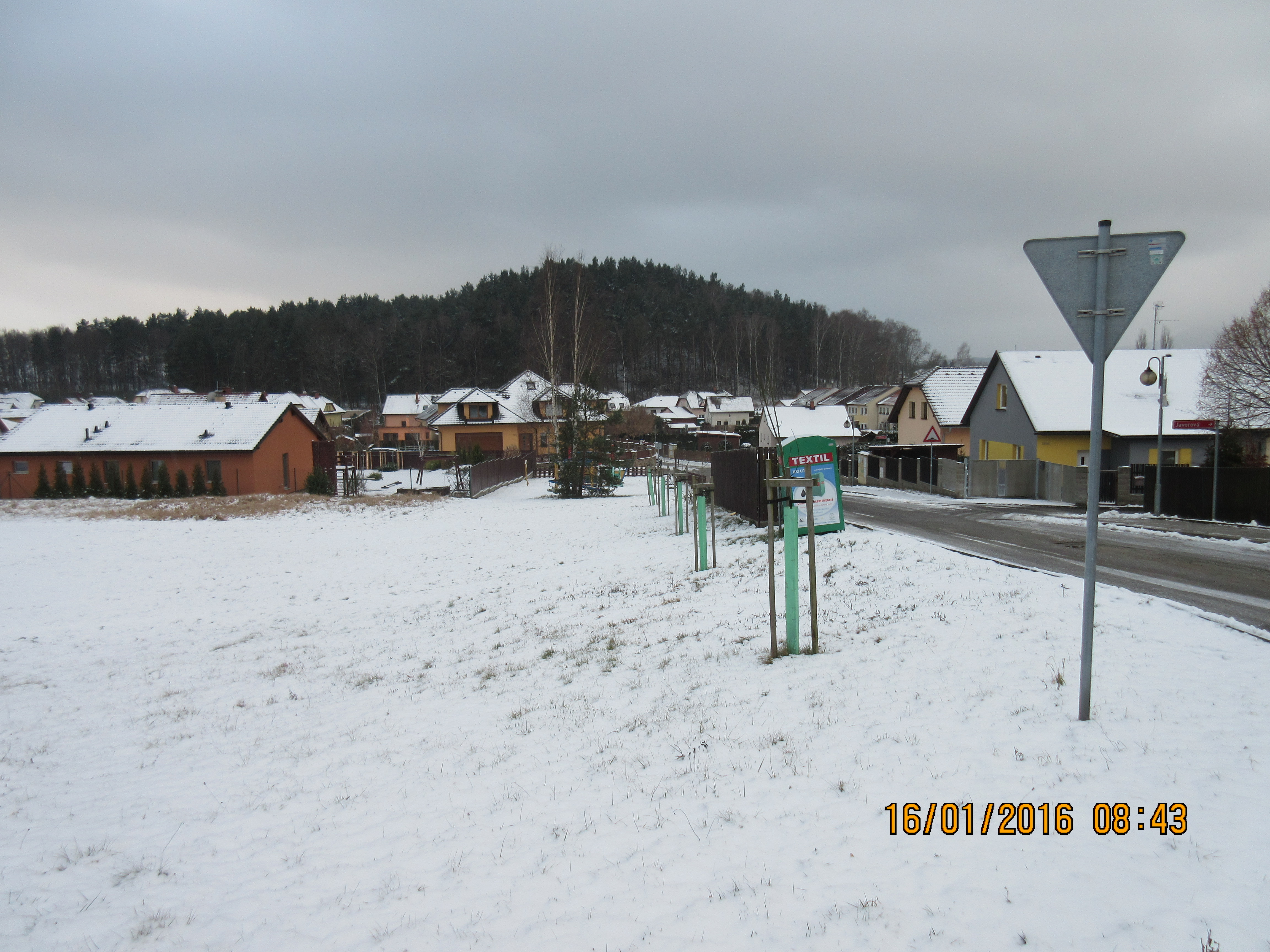 Kopeček focen z ulice Českých bratří ve Svárově